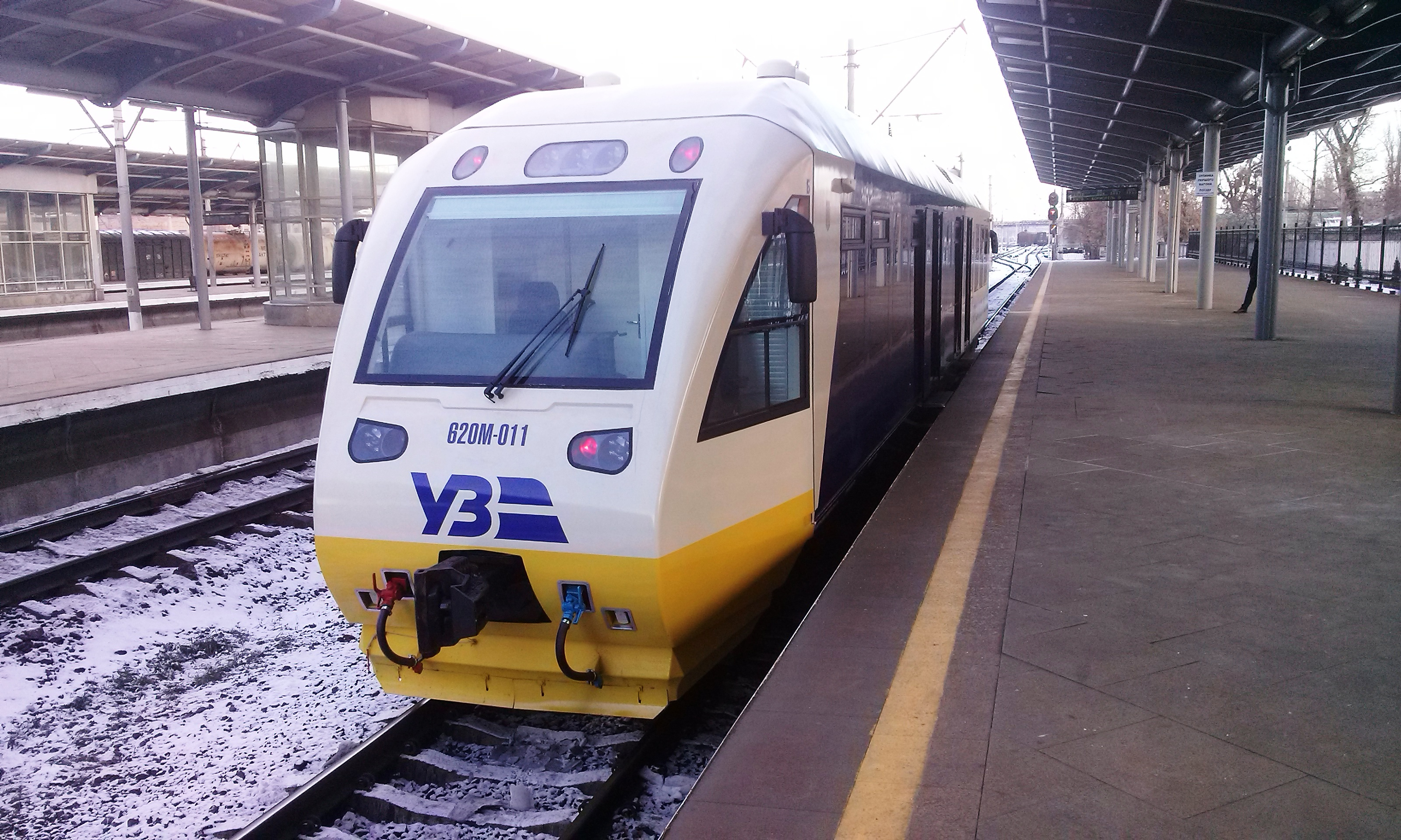 Рельсобус Kyiv Boryspil Express на станції Дарниця